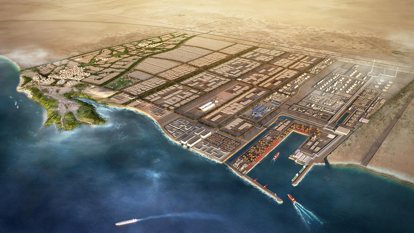 صورة تخيلة للمدينة الصناعية